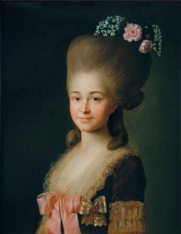 Екатерина Ивановна Нелидова